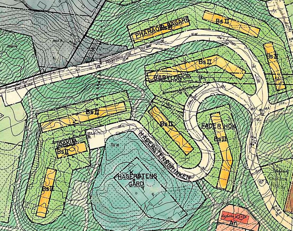 Stadsplan över radhusen vid Hägerstensbrinken och Hägerstens allé